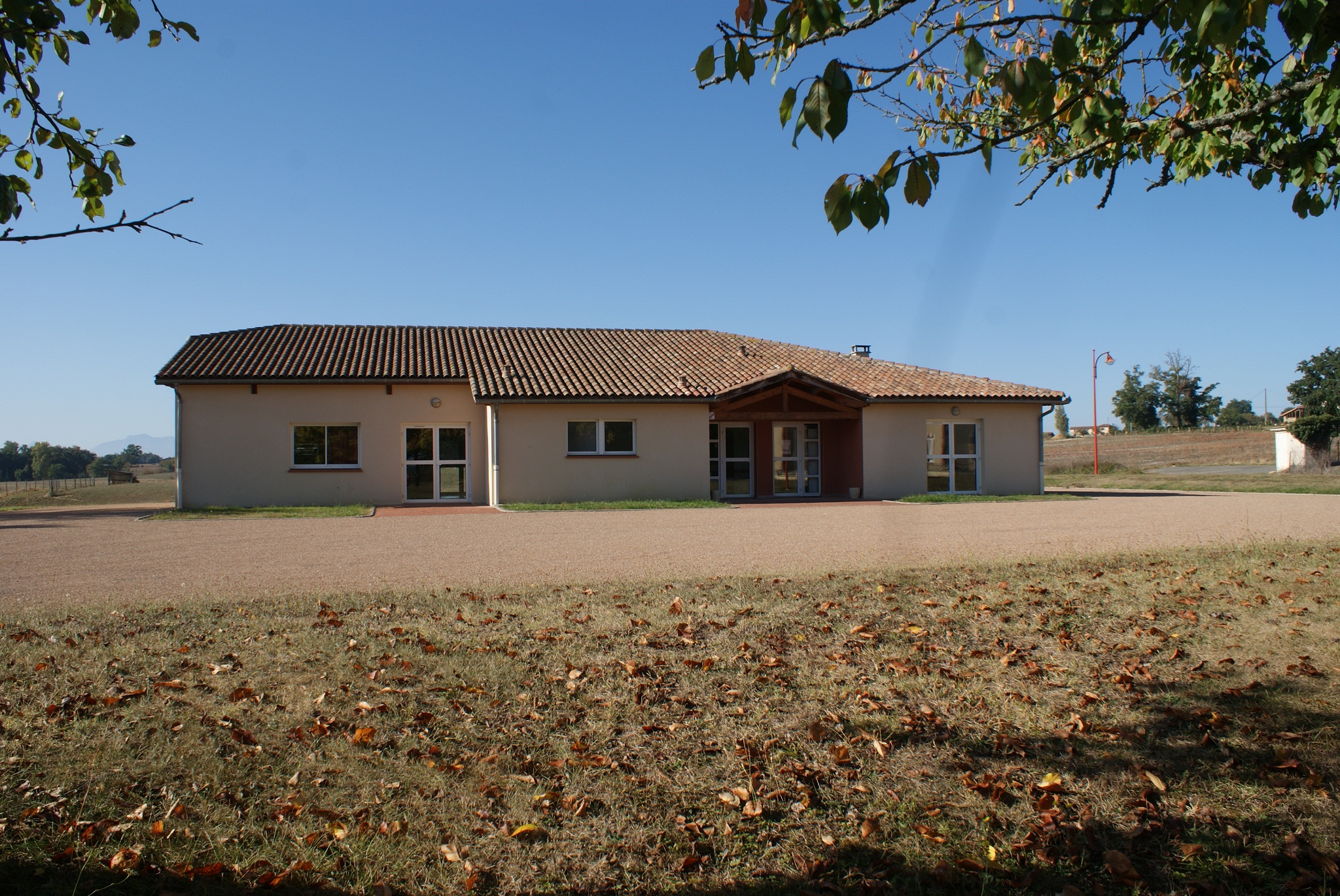 Feestzaal.